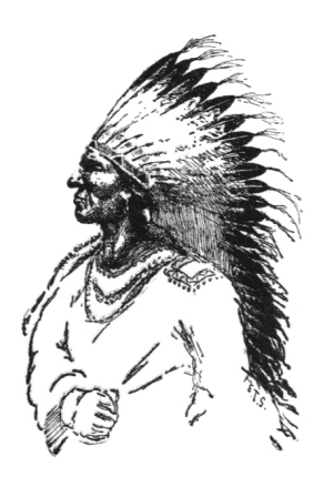 Рисунок Эрнеста Сетона-Томпсона из книги "Маленькие дикари" ("Two Little Savages").